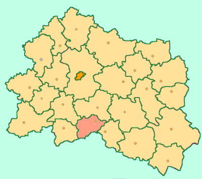 Orel Oblast map by Al Silonov Карта районов Орловской области